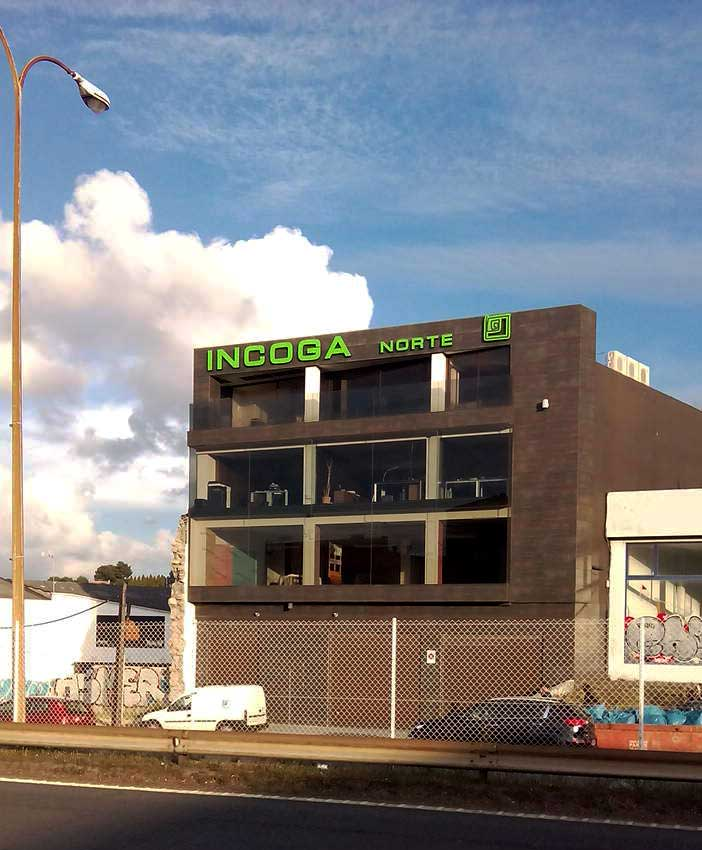 Incoga Norte, sede da Coruña na Estrada Baños de Arteixo.